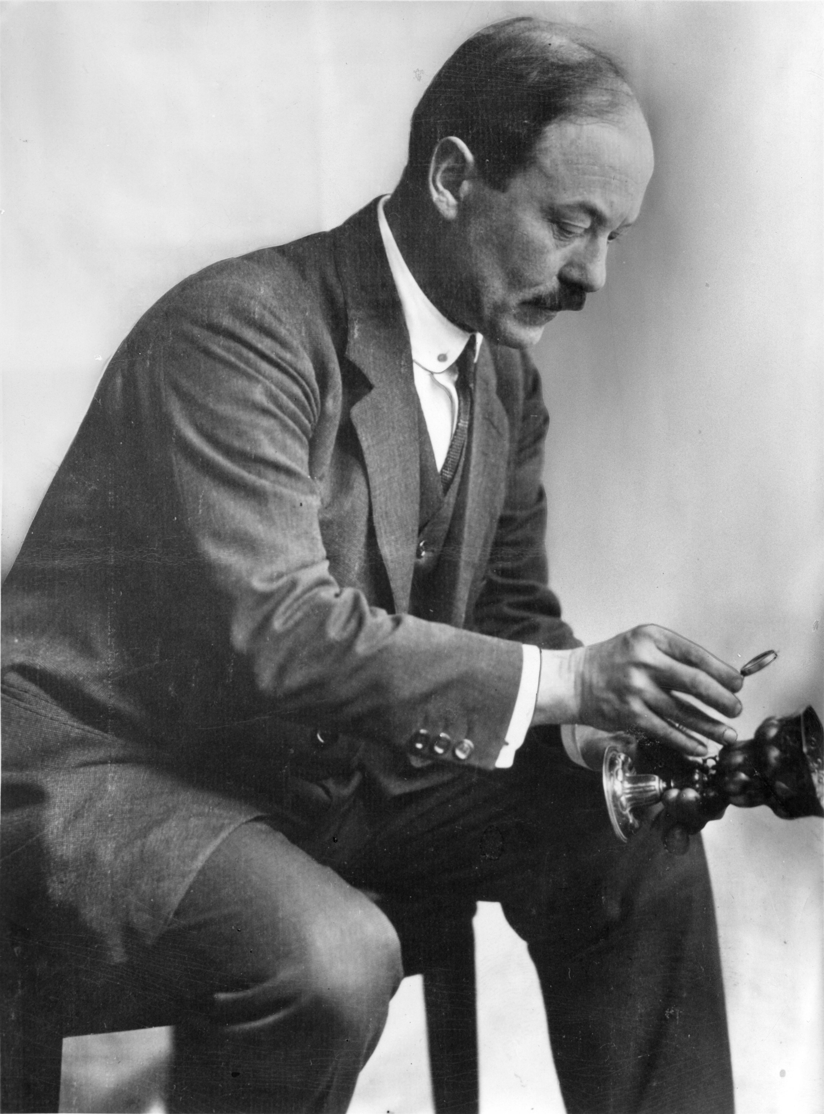 portrait